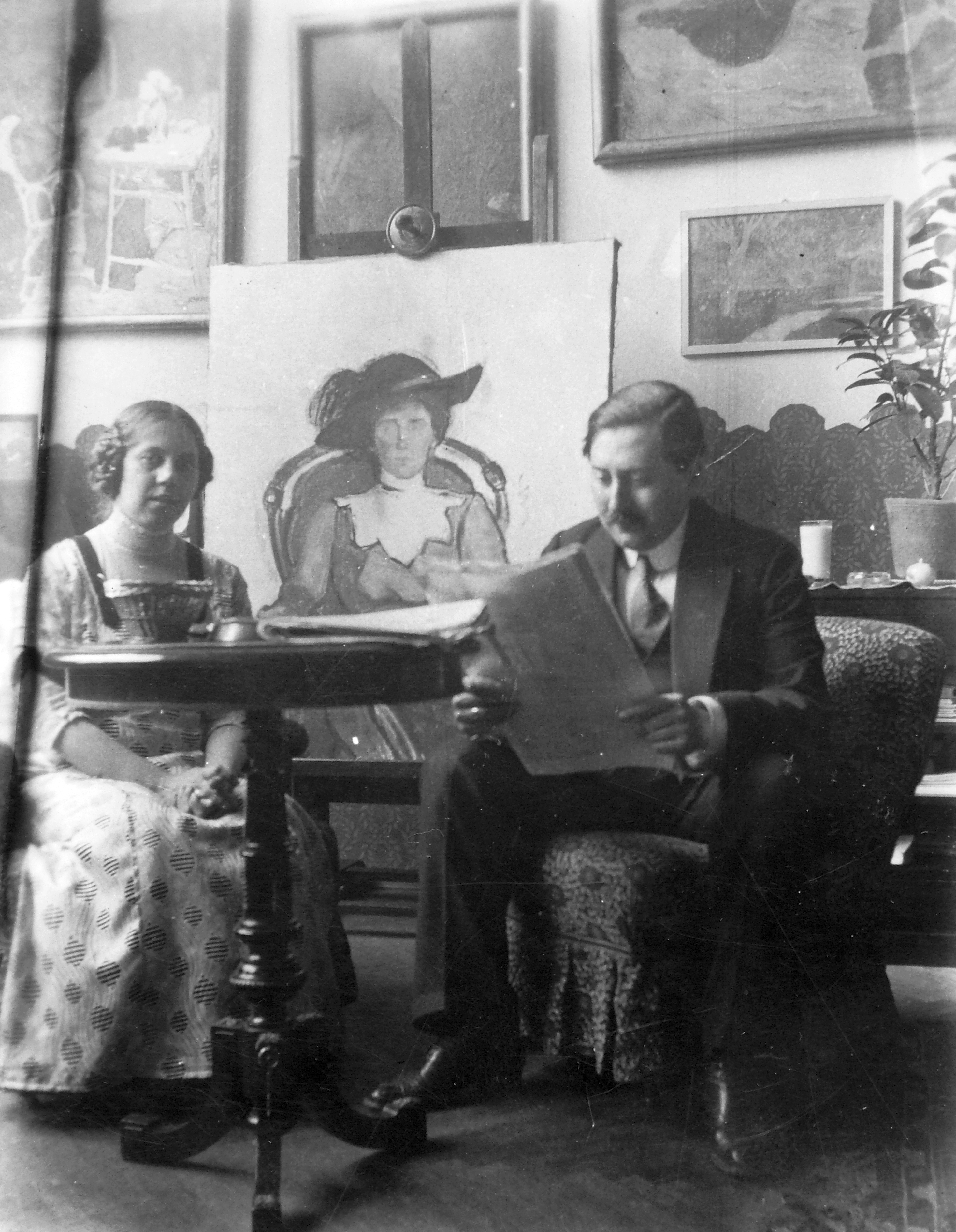 Attila út 35. (Attila körút 2.), Lakatos Artúr festő és iparművész, feleségével, Visy Erzsébettel. Középen Visy Masa portréja látható. Location: Hungary, Budapest I. Tags: painting, studio, Budapest Title: Attila út 35. (Attila körút 2.), Lakatos Artúr festő és iparművész, feleségével, Visy Erzsébettel. Középen Visy Masa portréja látható.